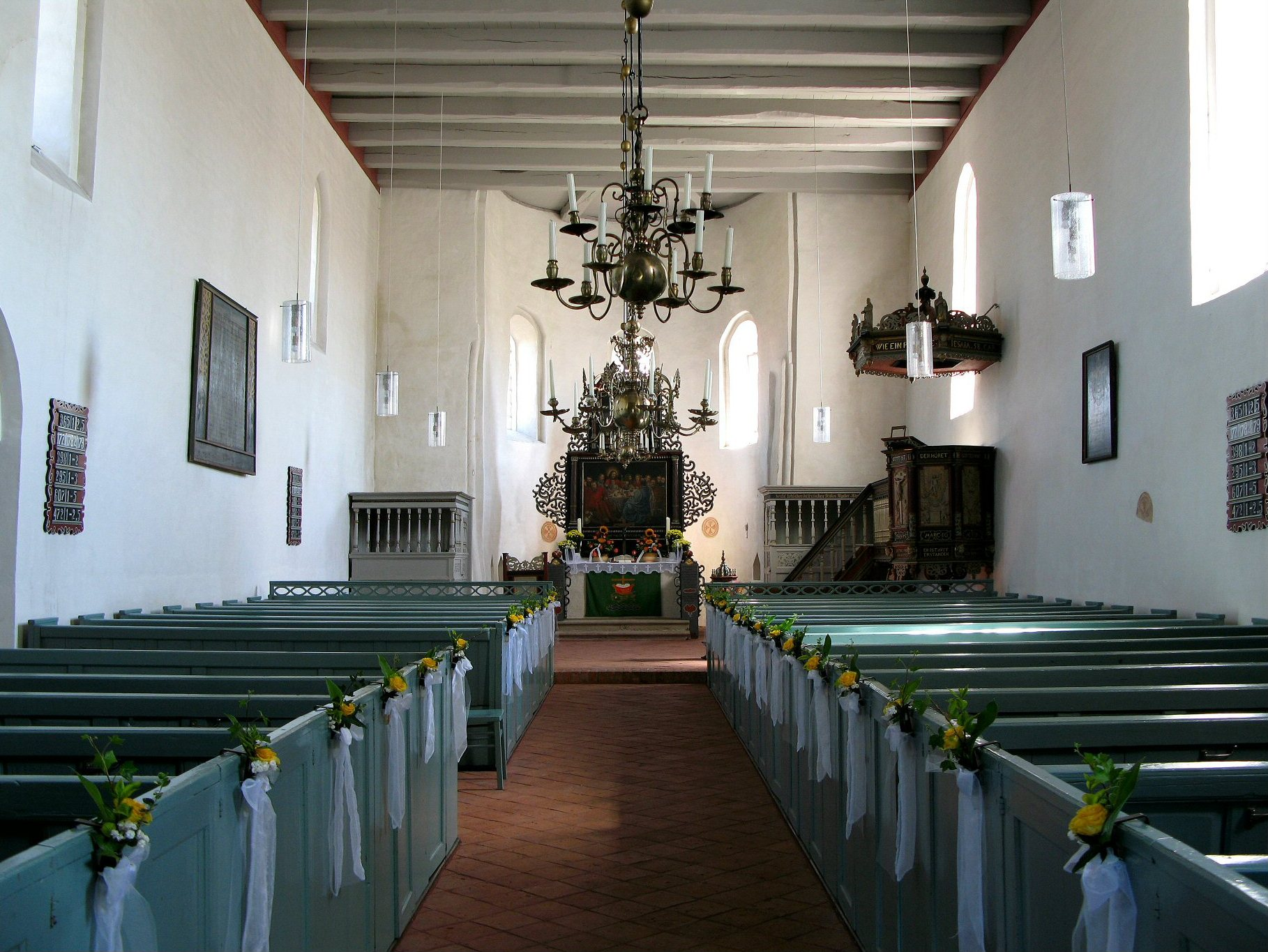 Orgel in der St.-Mauritiuskirche in Horsten, Ostfriesland, Niedersachsen